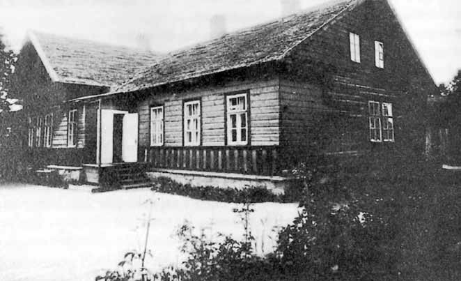 Учительская семинария (старое здание) в Малых Колпанах.